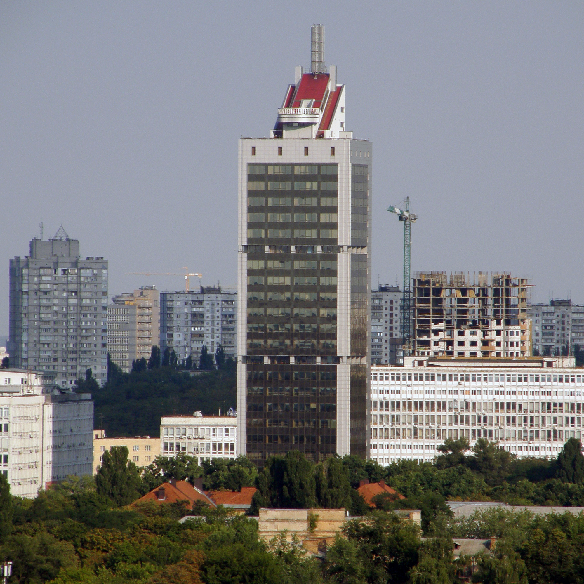 здание апелляционного суда г. Киева